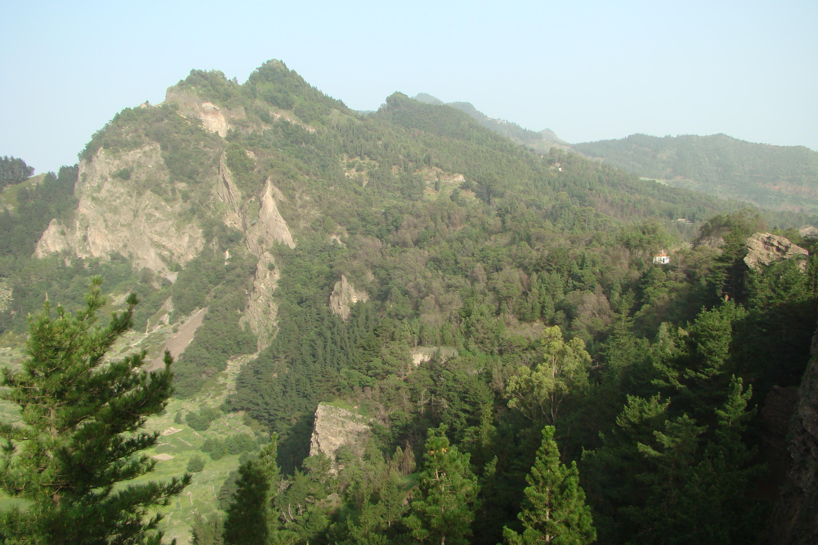 Pico da Cruz, en la isla de Santo Antao, Cabo Verde